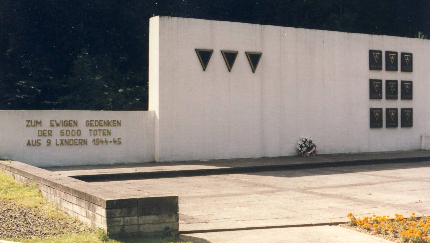 Gedenkstätte für Zwangsarbeiter der REIMAHG, 1996